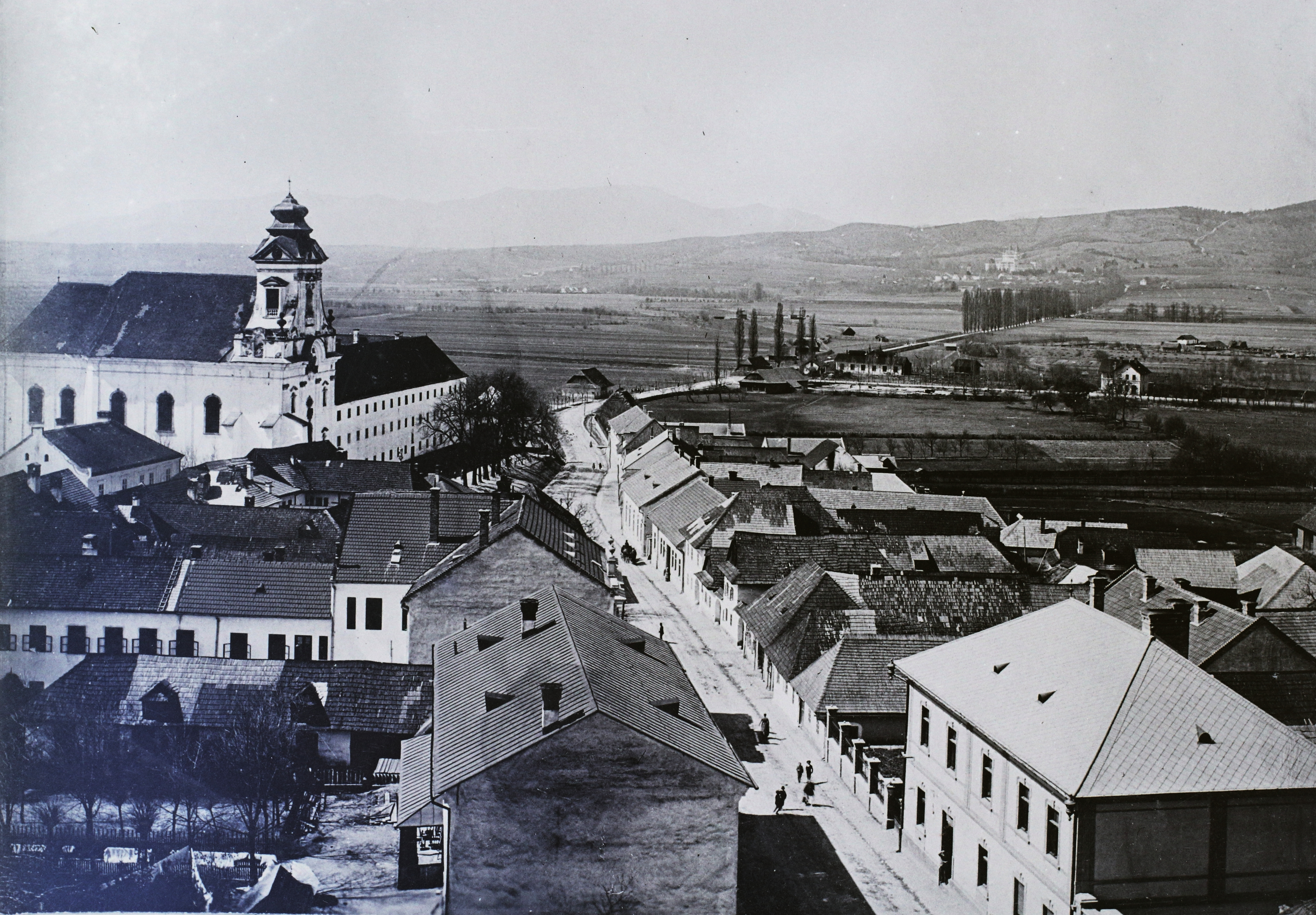 Rákóczi utca, balra a piarista templom és gimnázium. Location: Slovakia, Prievidza Tags: bird's eye view, roof Title: Rákóczi utca, balra a piarista templom és gimnázium.